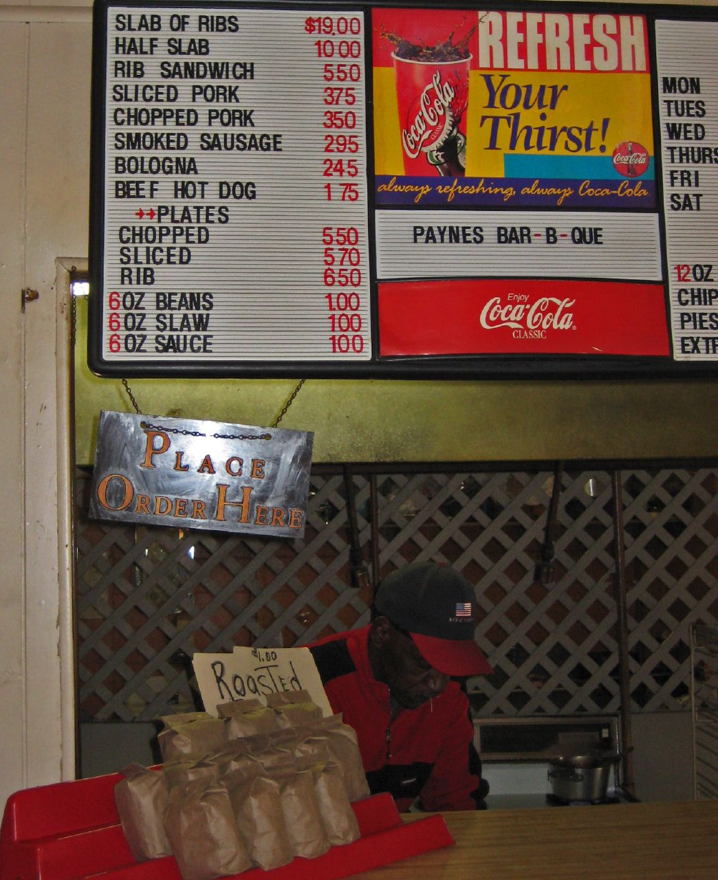 Karte von Payne’s Bar-B-Q – einem der bekanntesten und beliebtesten Restaurants in Memphis.